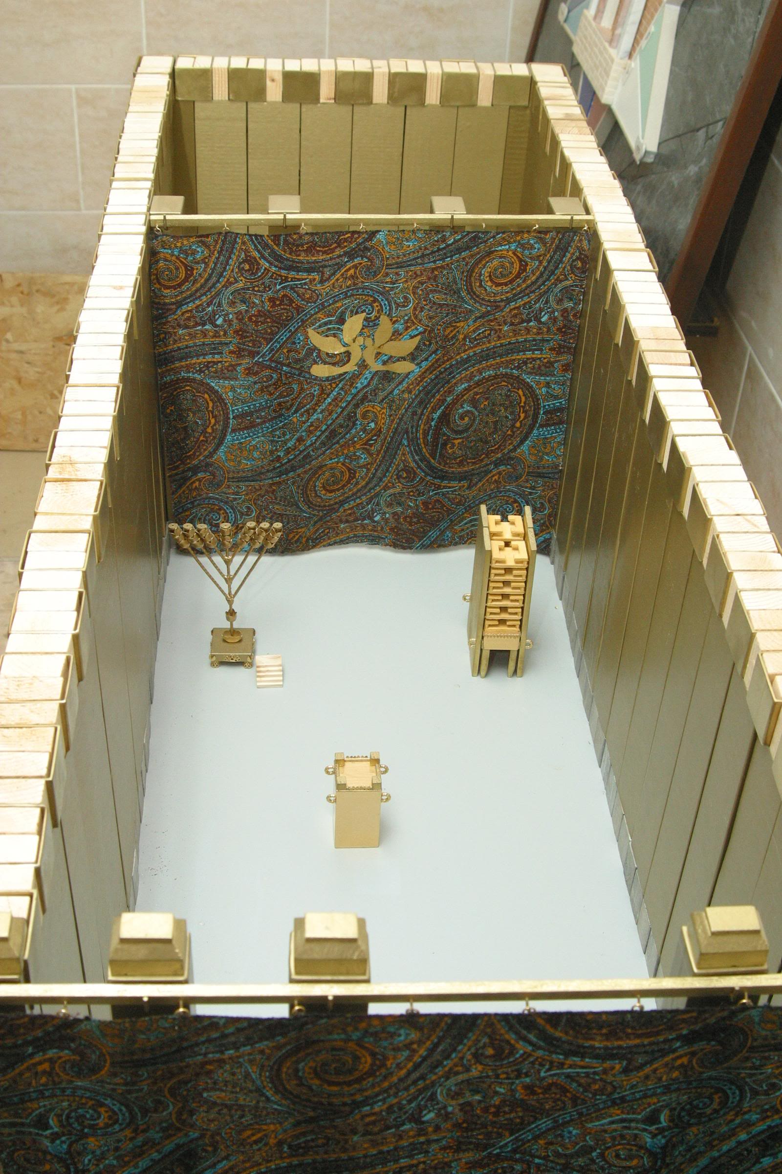 דגם משכן העדות שנוצר על ידי מיכאל אוסניס מקדומים